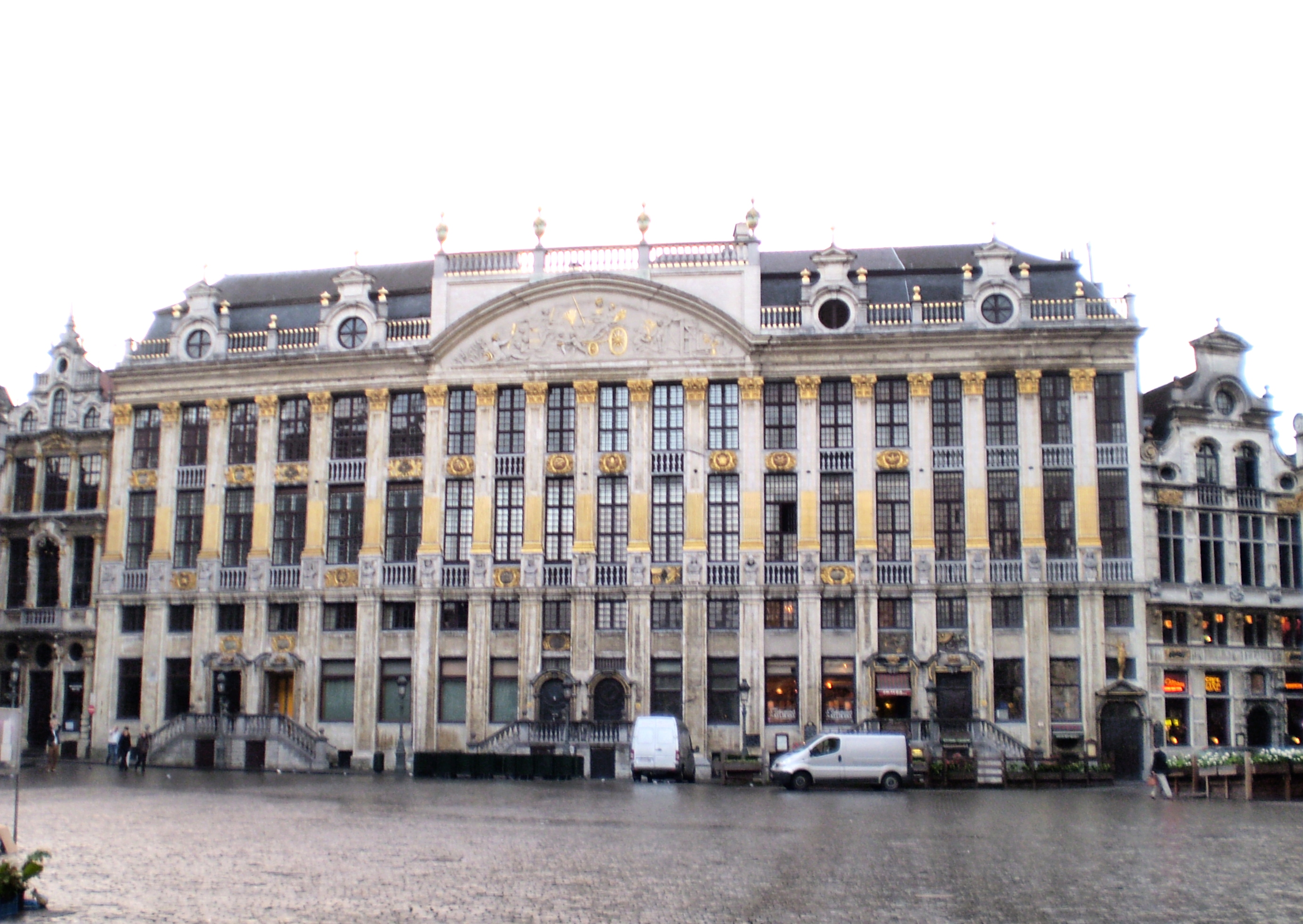 Maisons de la Grand-Place de Bruxelles, entre la rue de la Colline et la rue des Chapeliers (est): La Balance (rue de la Colline),La Maison des ducs de Brabant, groupe de sept maisons réunies derrière une façades unique: La Bourse, La Colline, Le Pot d'étain, Le Moulin à vent, La Fortune, L'Ermitage et La Renommée, Alsemberg